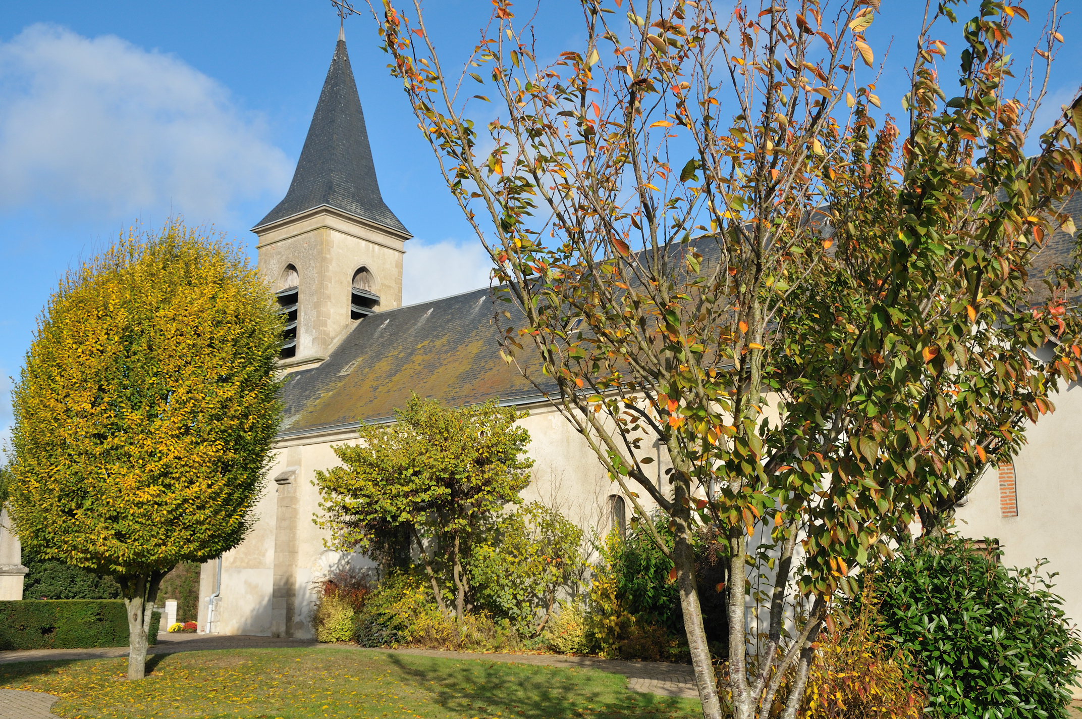 Église Saint-Martin, Saint-Martin-sur-Ocre, Loiret, France